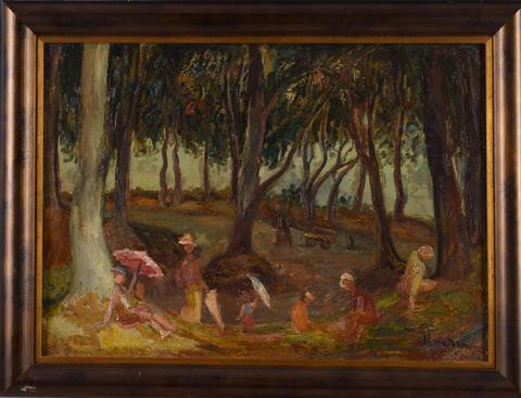 Obraz zainspirowany Gajem Świętopełka